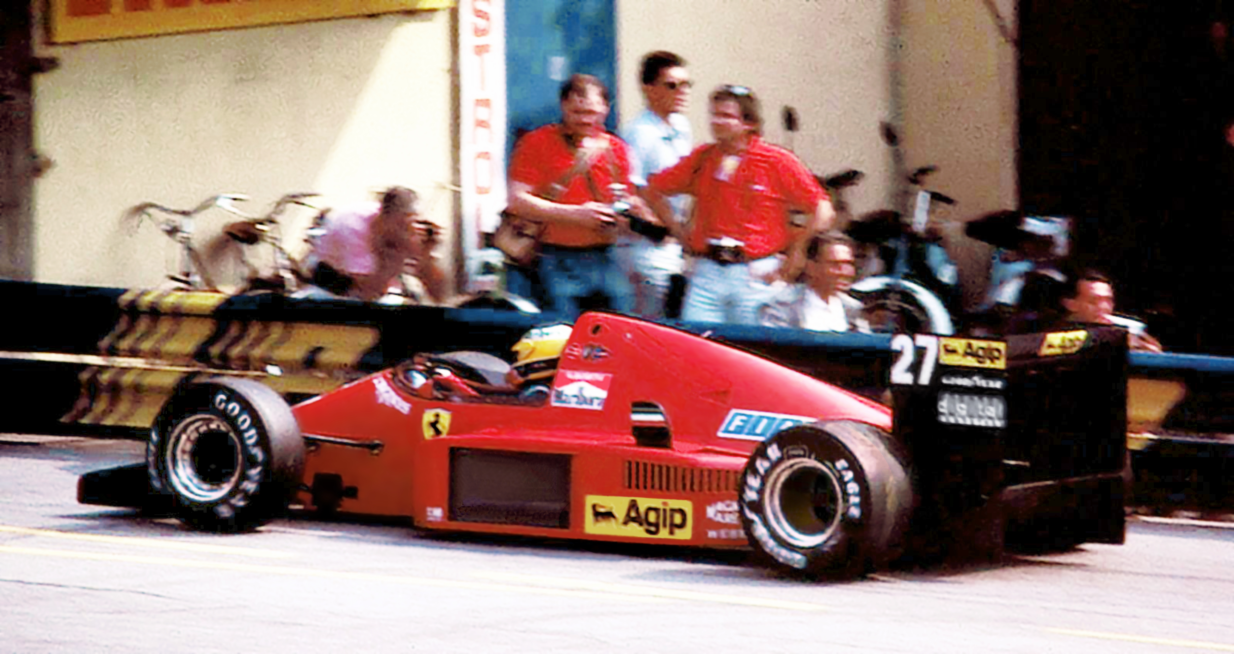 F1 GP Monza 1986 - Alboreto